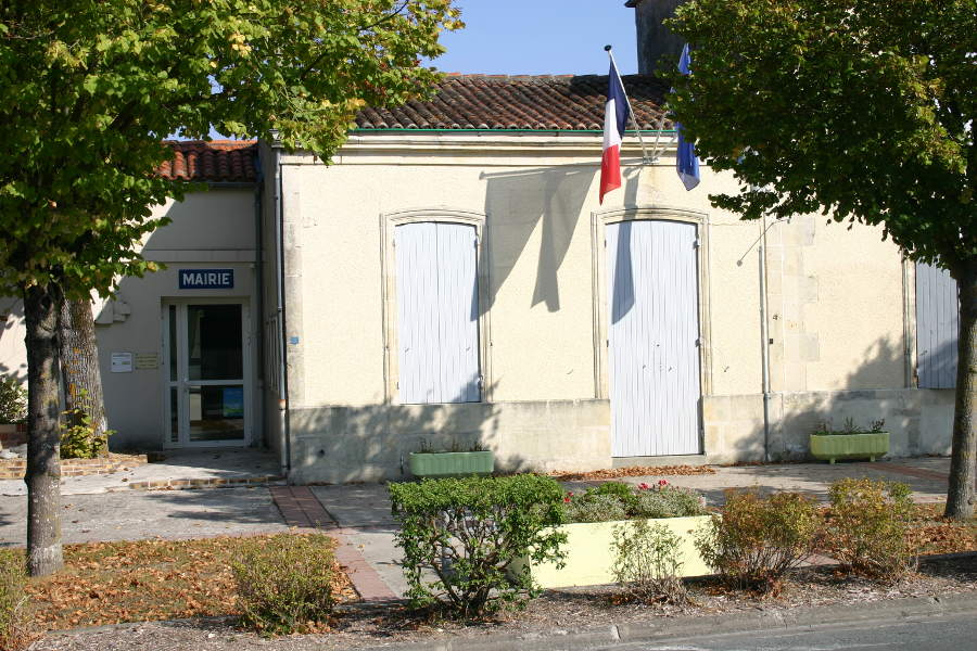 Mairie de La Vergne en Charente-Maritime